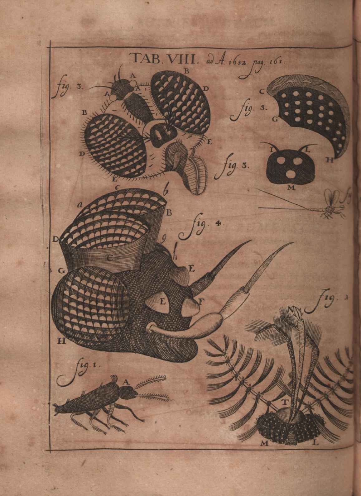 Illustration